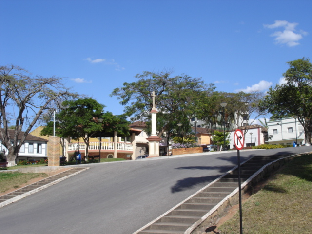 Praça central de São Gonçalo do Pará, Minas Gerais - Brasil.